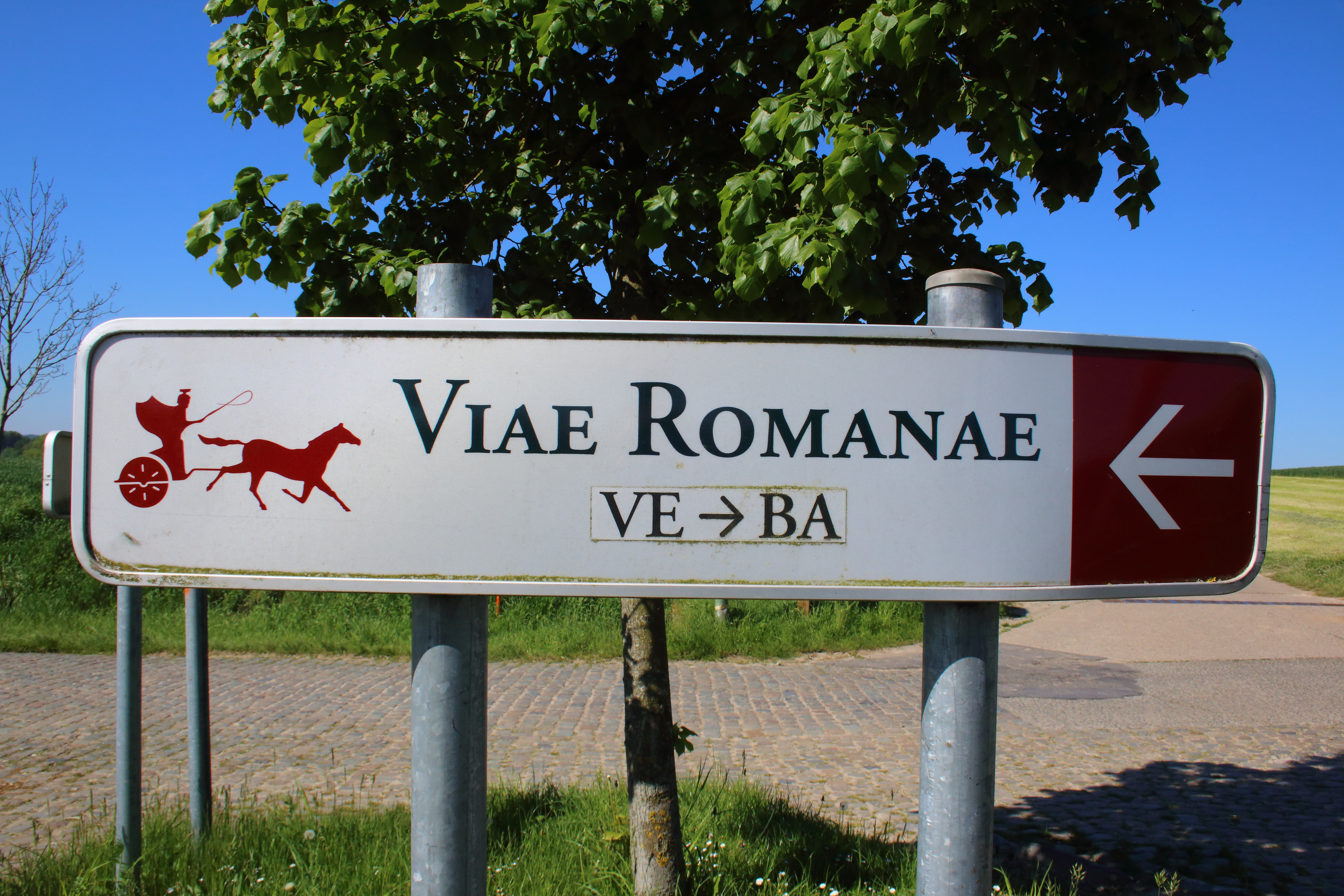 Romeinse weg Velzeke-Bavay, Velzeke, Zottegem, Vlaanderen, België